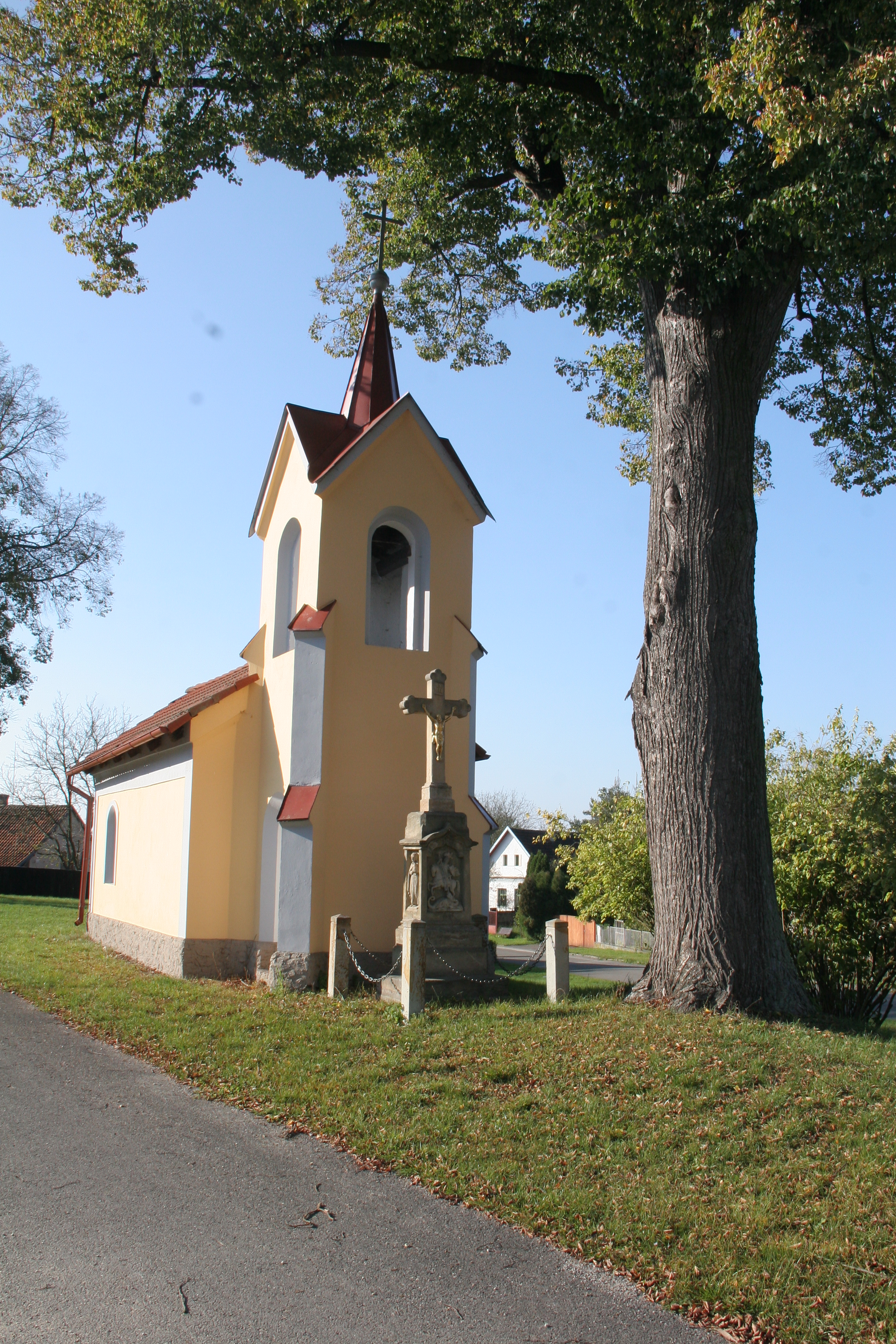 Týnišťko zvonička